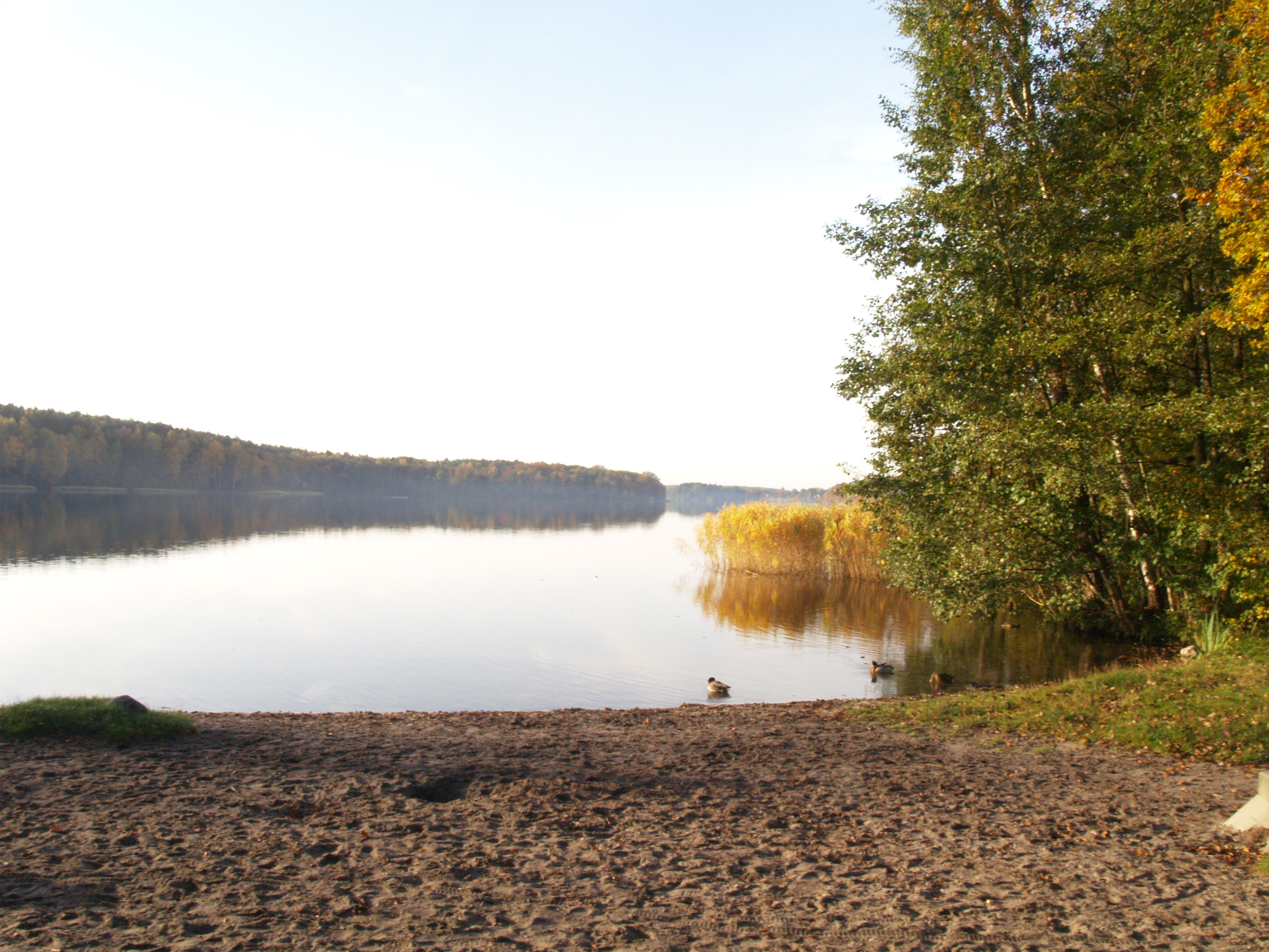 der Großensee - Blick von der nördlichen Badestelle